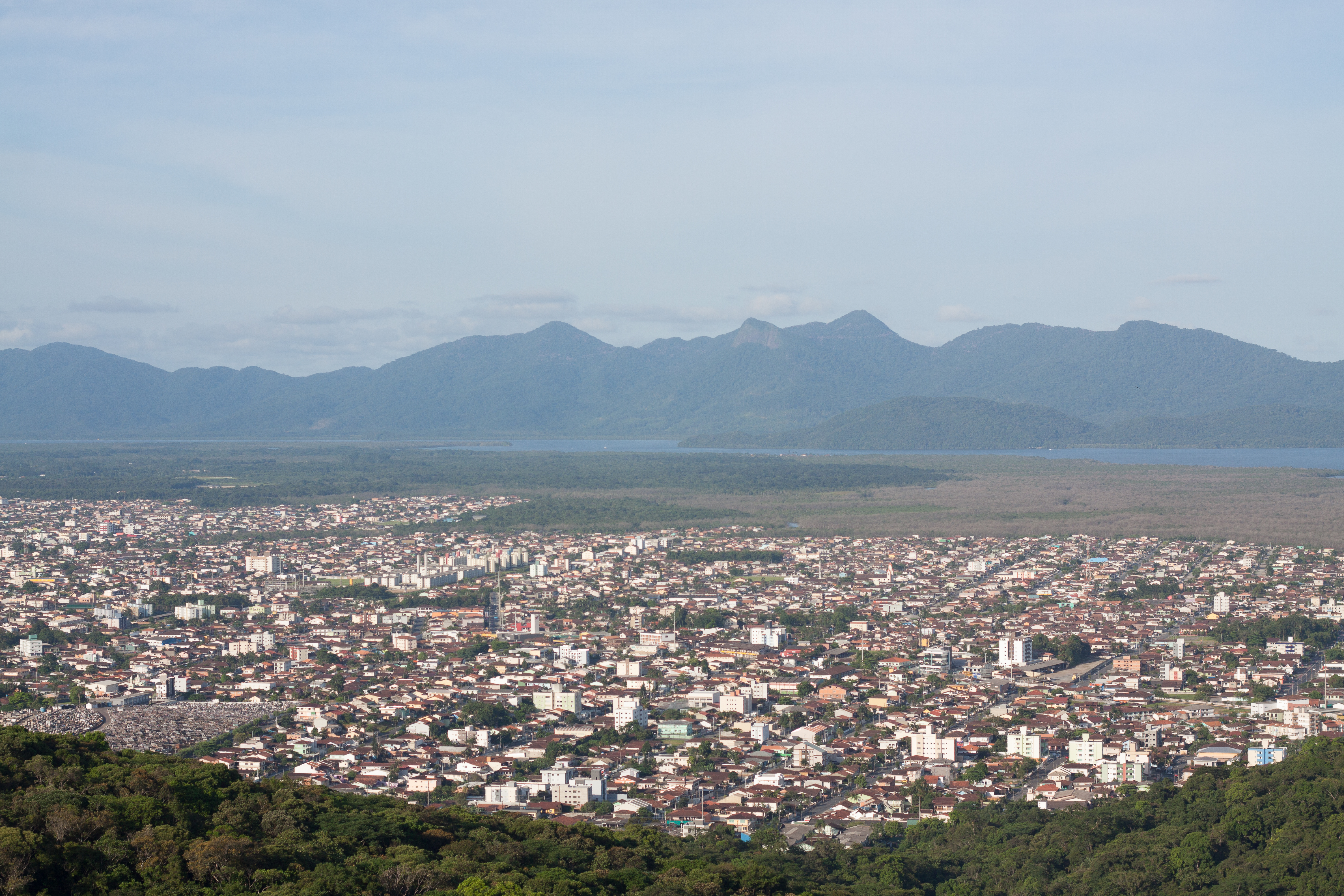 Mirante de Joinville